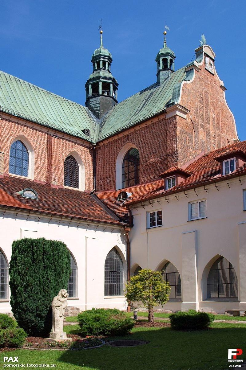 Widok z wirydarza.